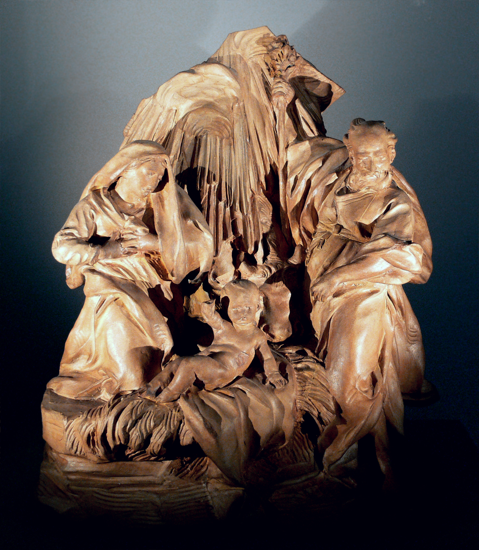 Umkreis Giuseppe M. Mazza: Heilige Familia, Bologna, Ton (ungefasst), 1. Hälfte 18. Jh.; Krippensammlung des Bayerischen Nationalmuseums, München, Inv. Nr. 63/14